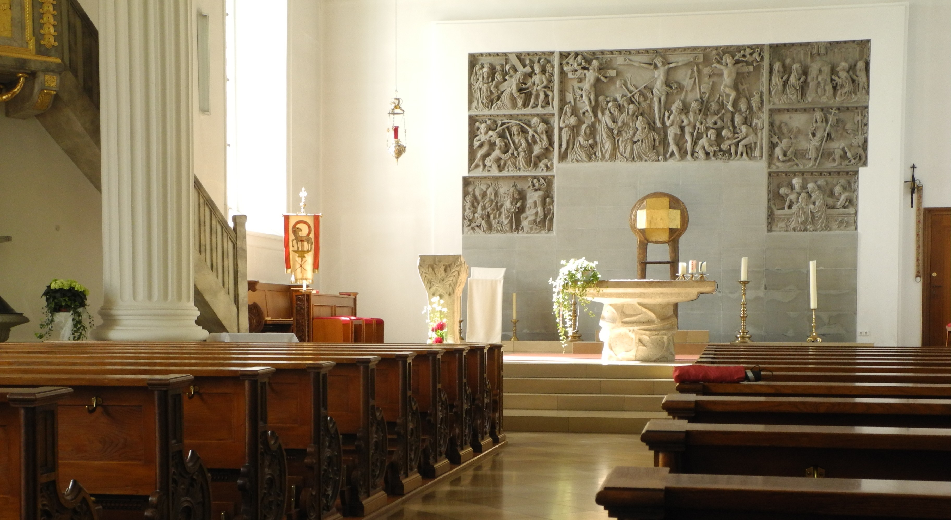 Oberdischingen - Kath. Kirche1804, Altar